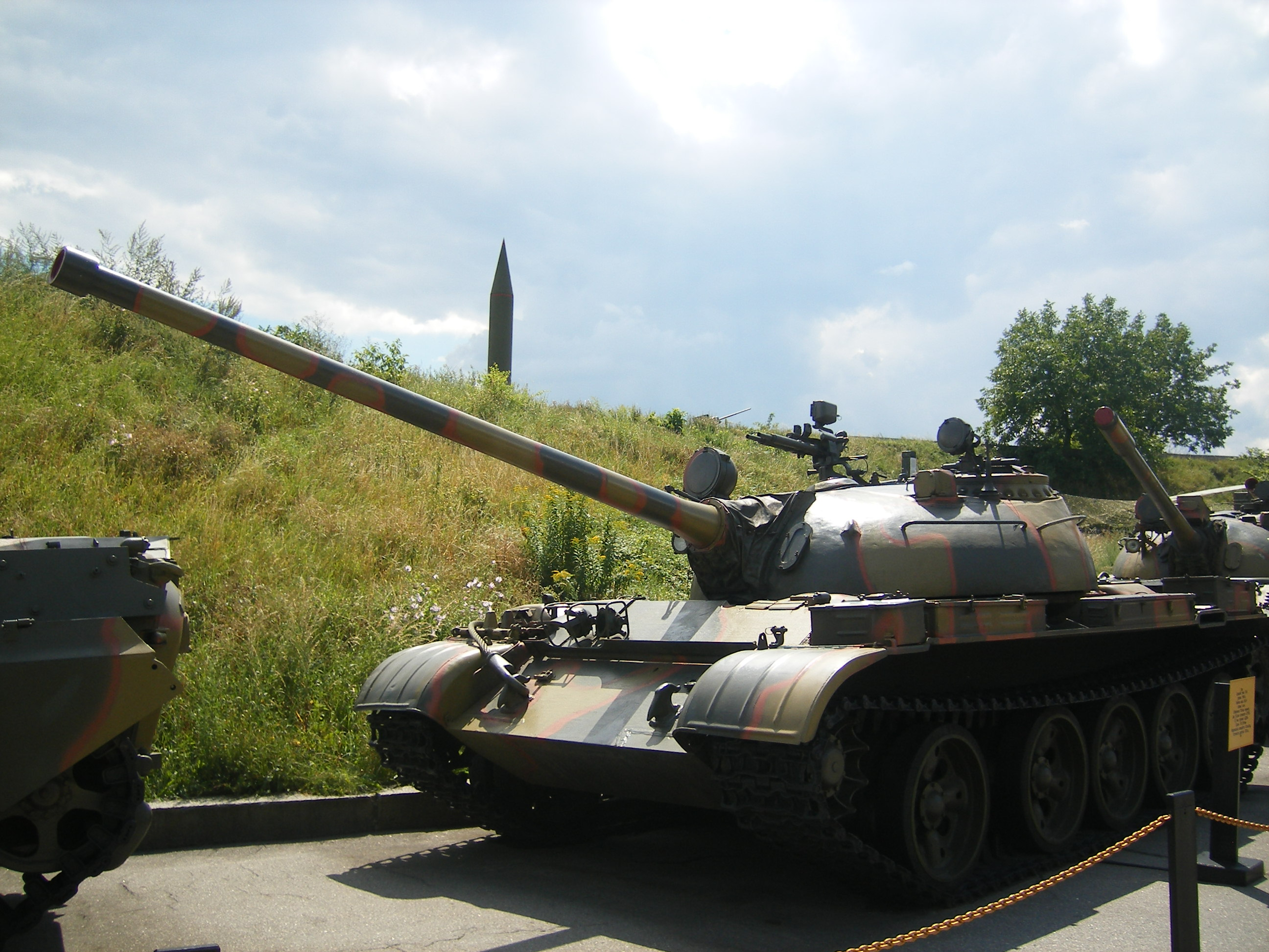 Комплекс Українського державного музею Великої Вітчизняної війни